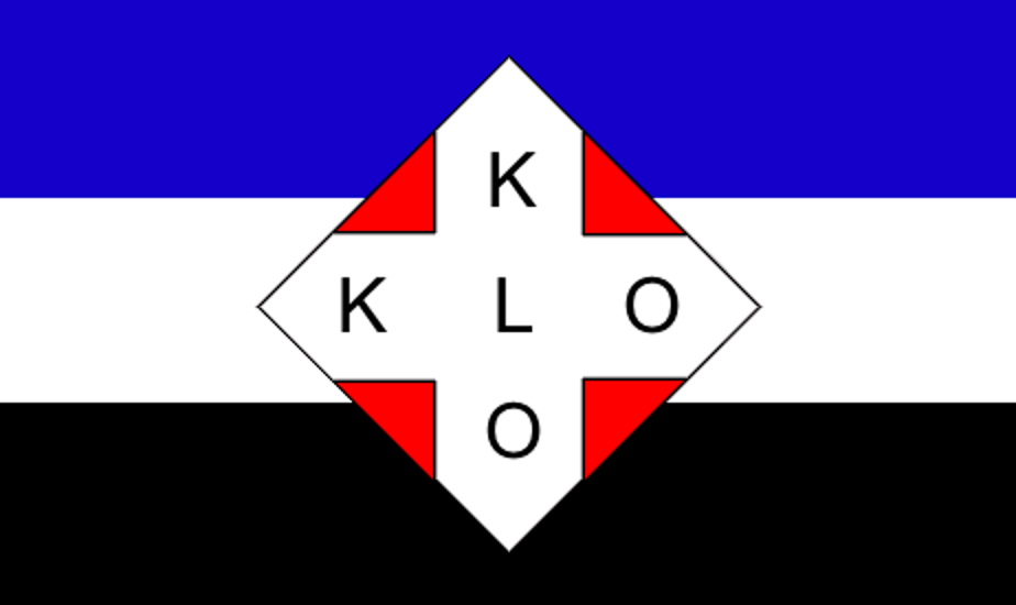 Sõjaeelse Eesti ettevõtte Käsmu Laevaomanikud lipp.